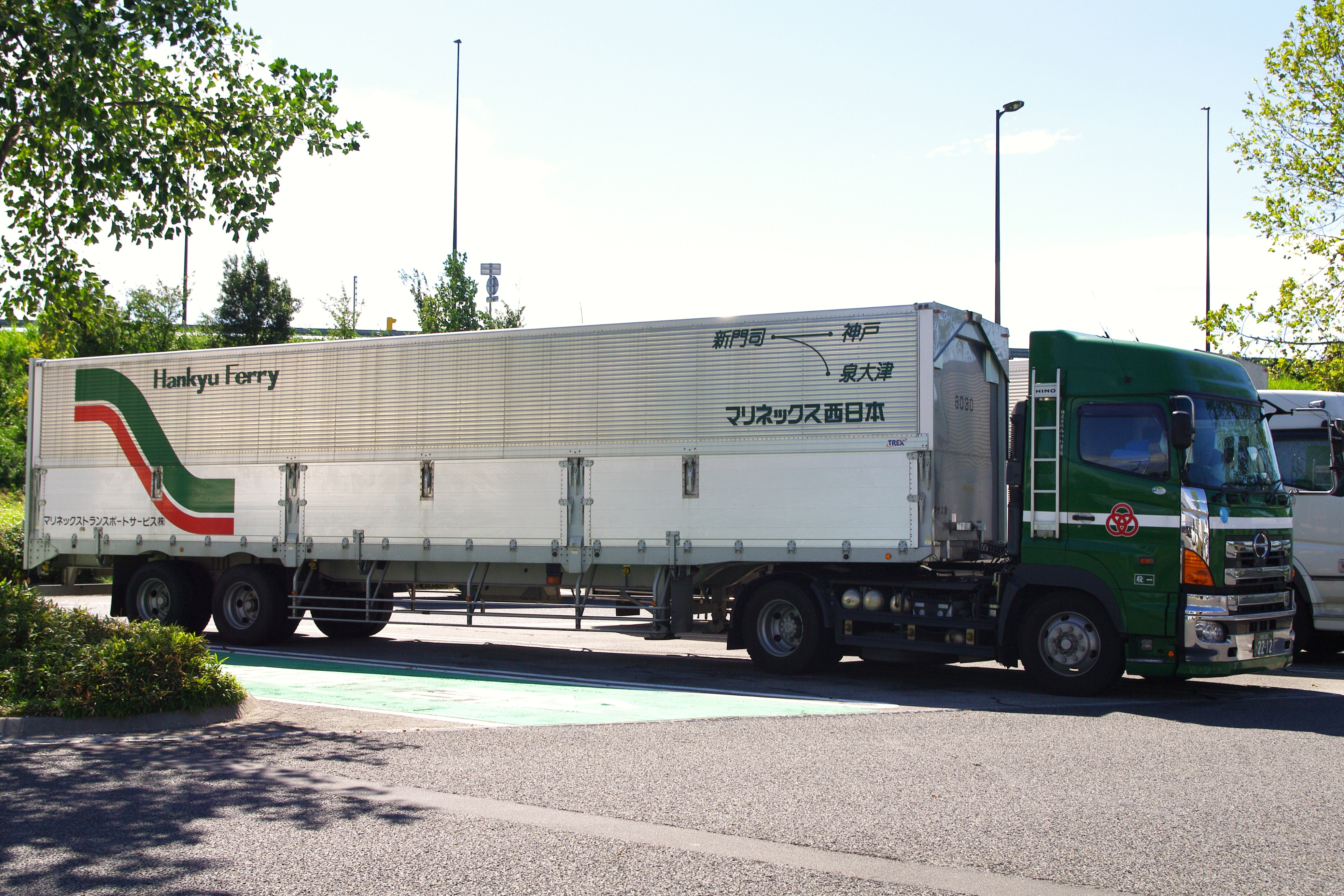 マリネックス西日本のウイングトレーラー